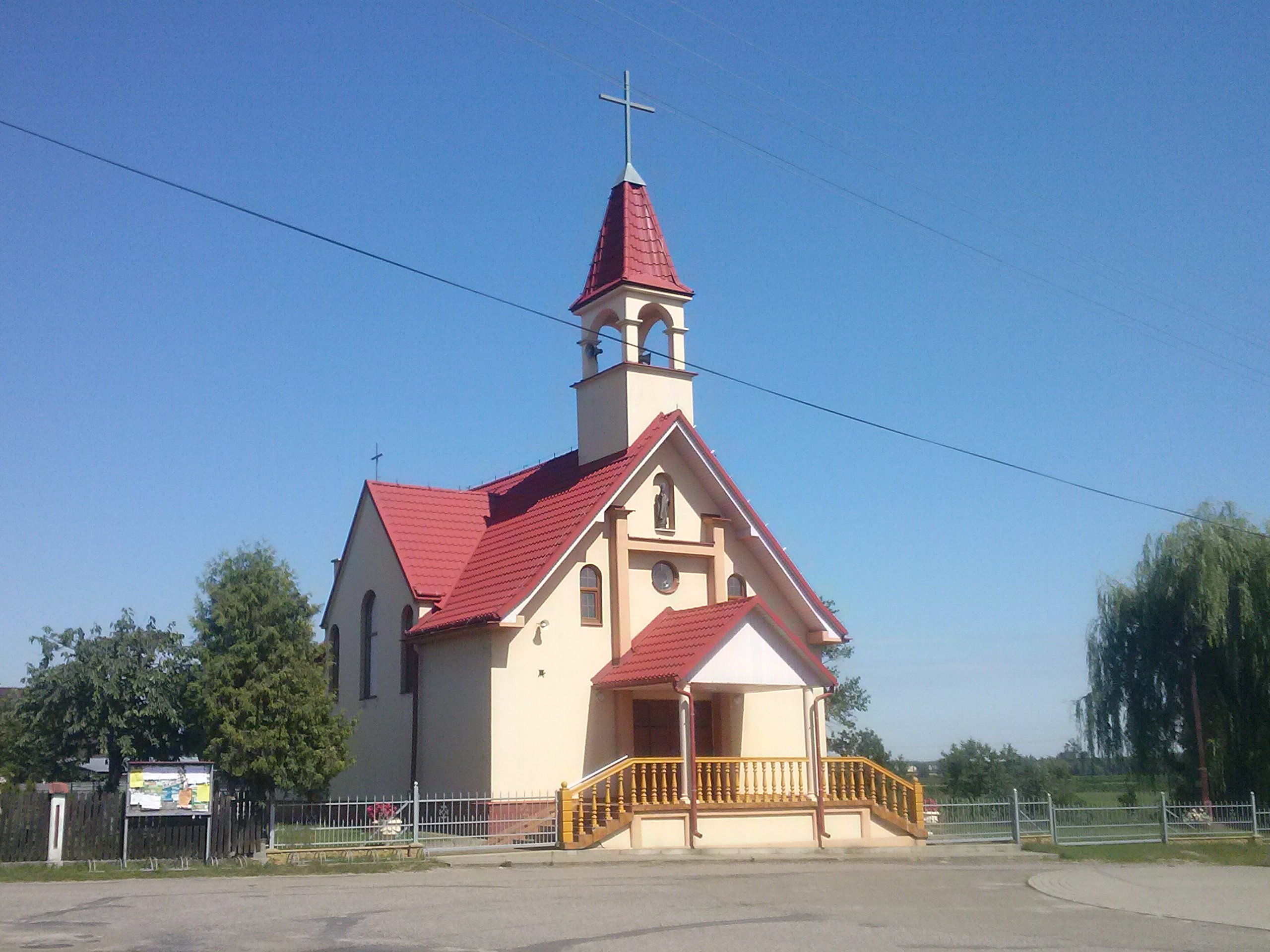 Kościół filialny w Nielepkowicach